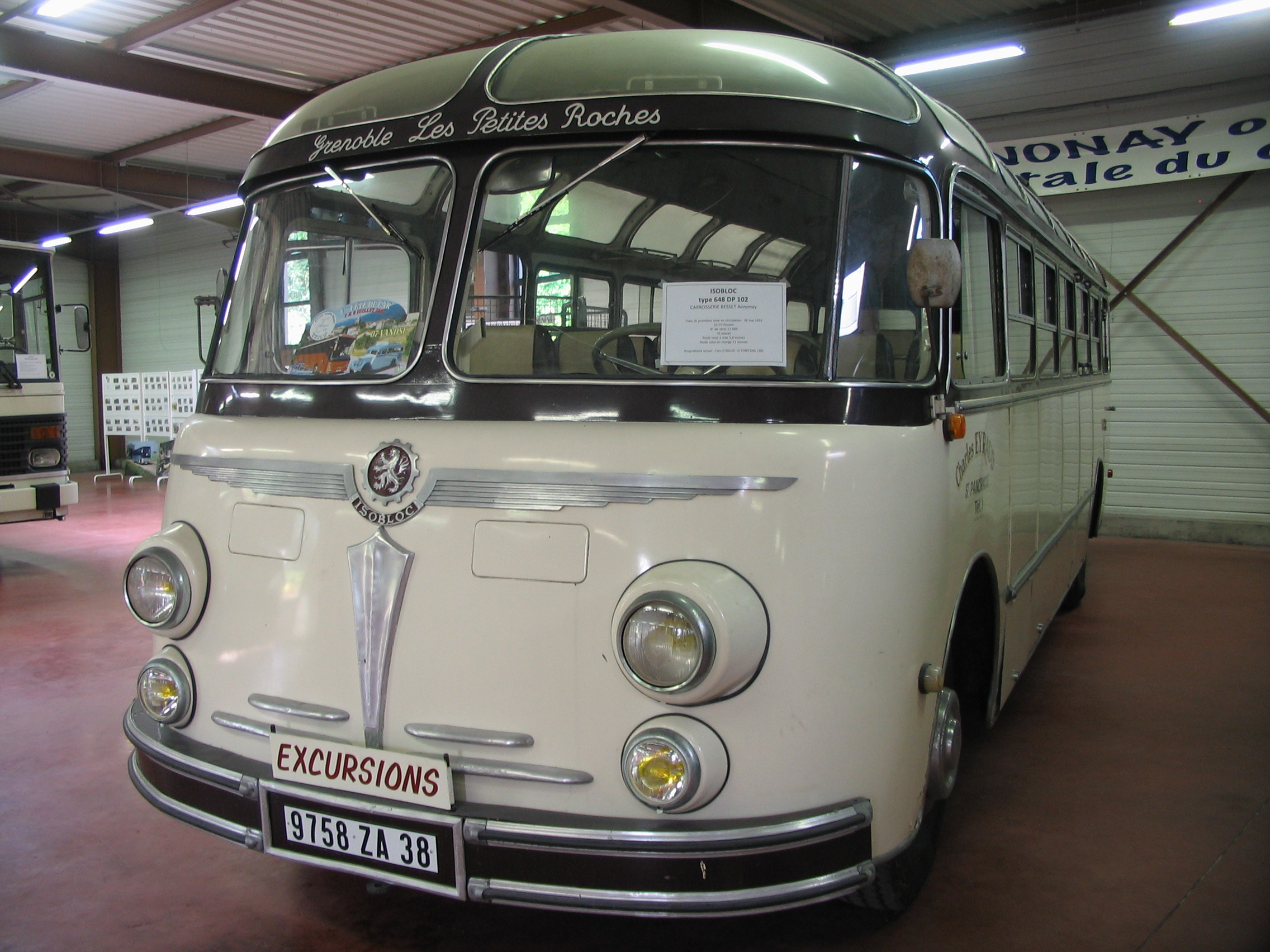 Isobloc restauré, à l'Espace Joseph Besset de Vanosc